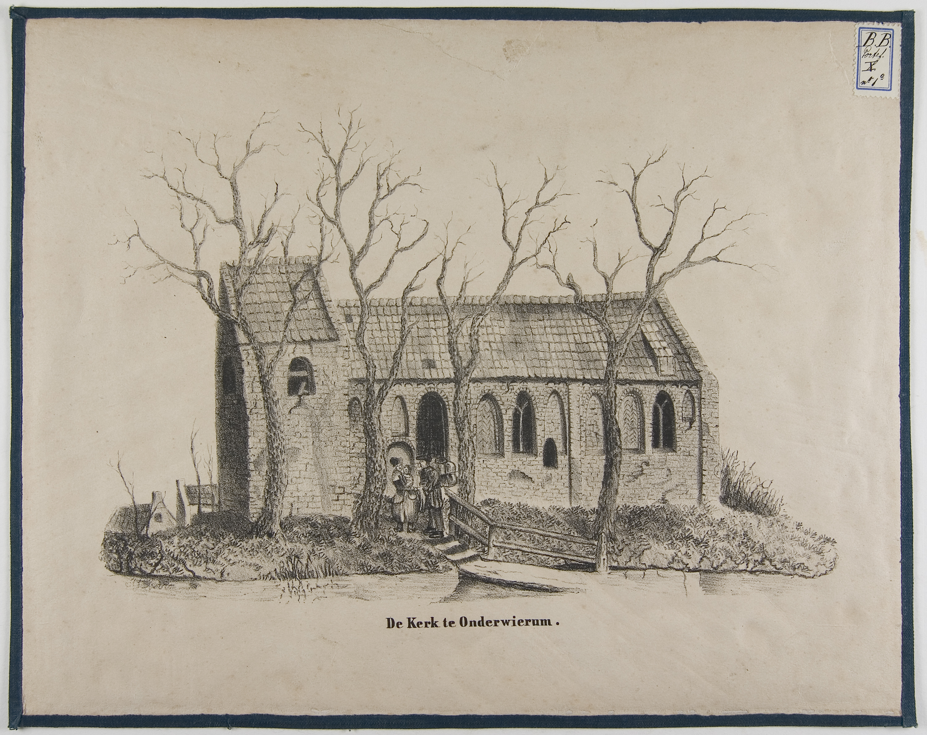 Oude kerk van Onderwierum, gesloopt in 1841.